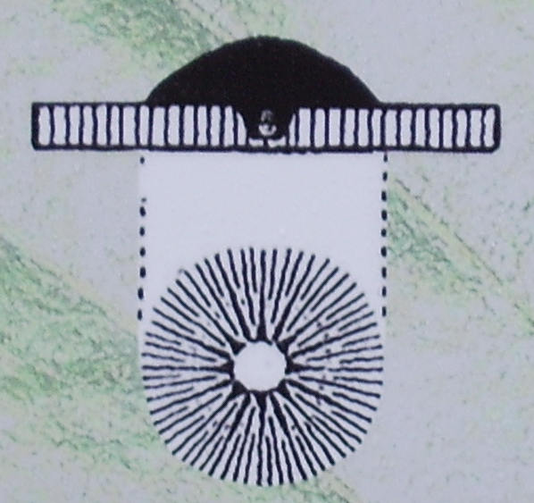 Zeichnung